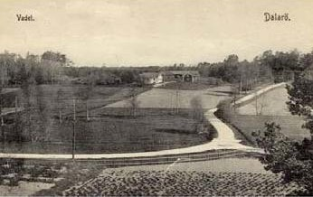 Dalarövägen omkring 1900